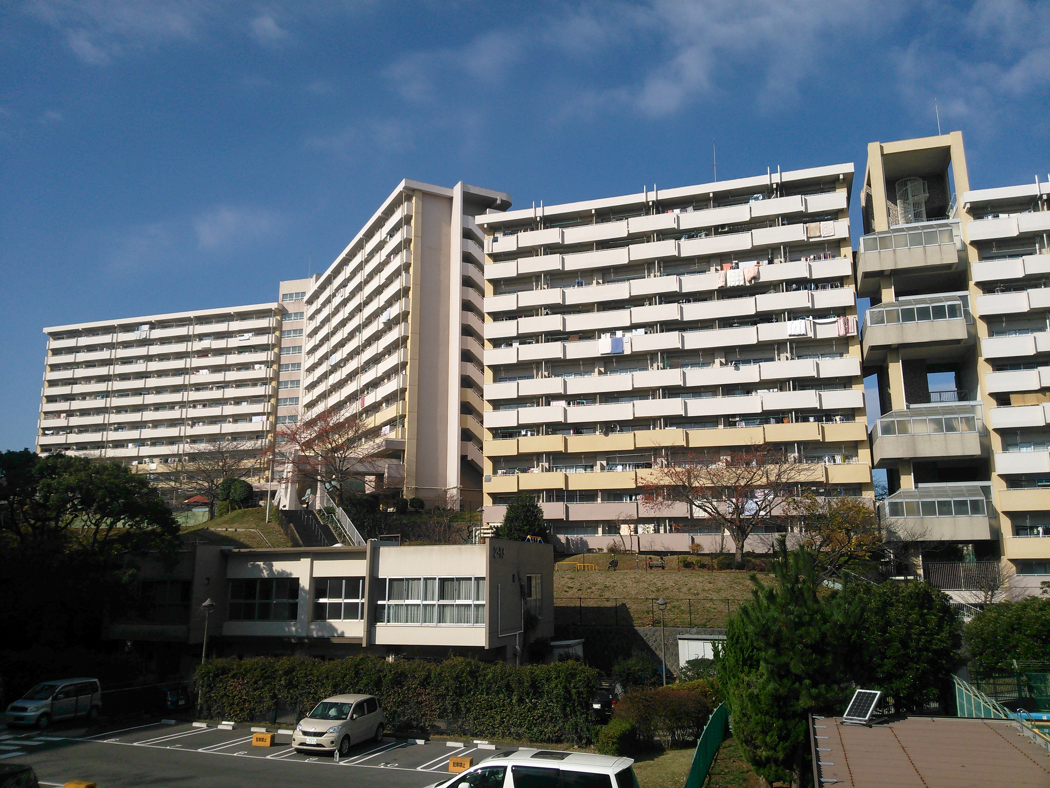 横浜市南区永田みなみ台、南永田団地